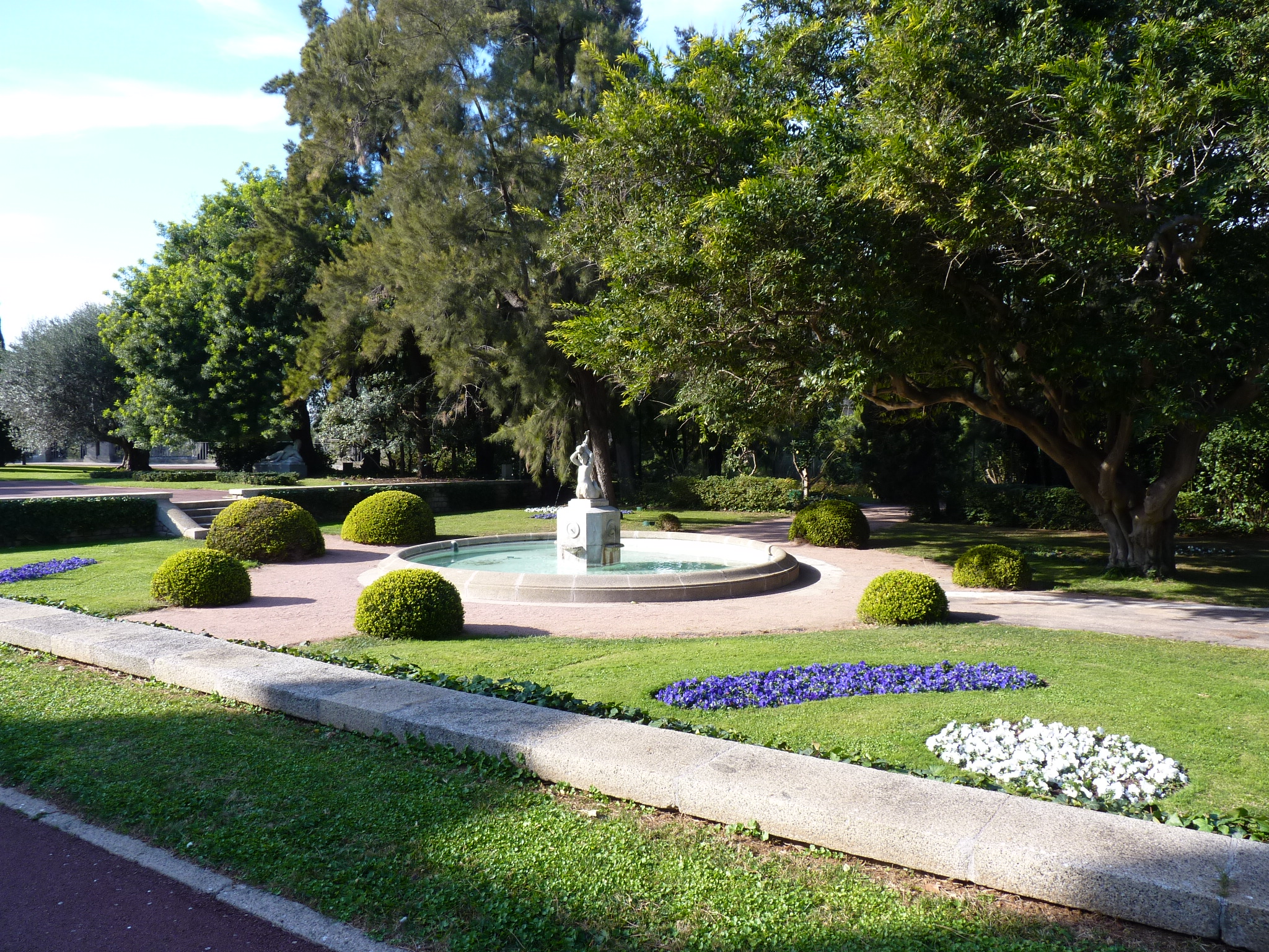 Jardins